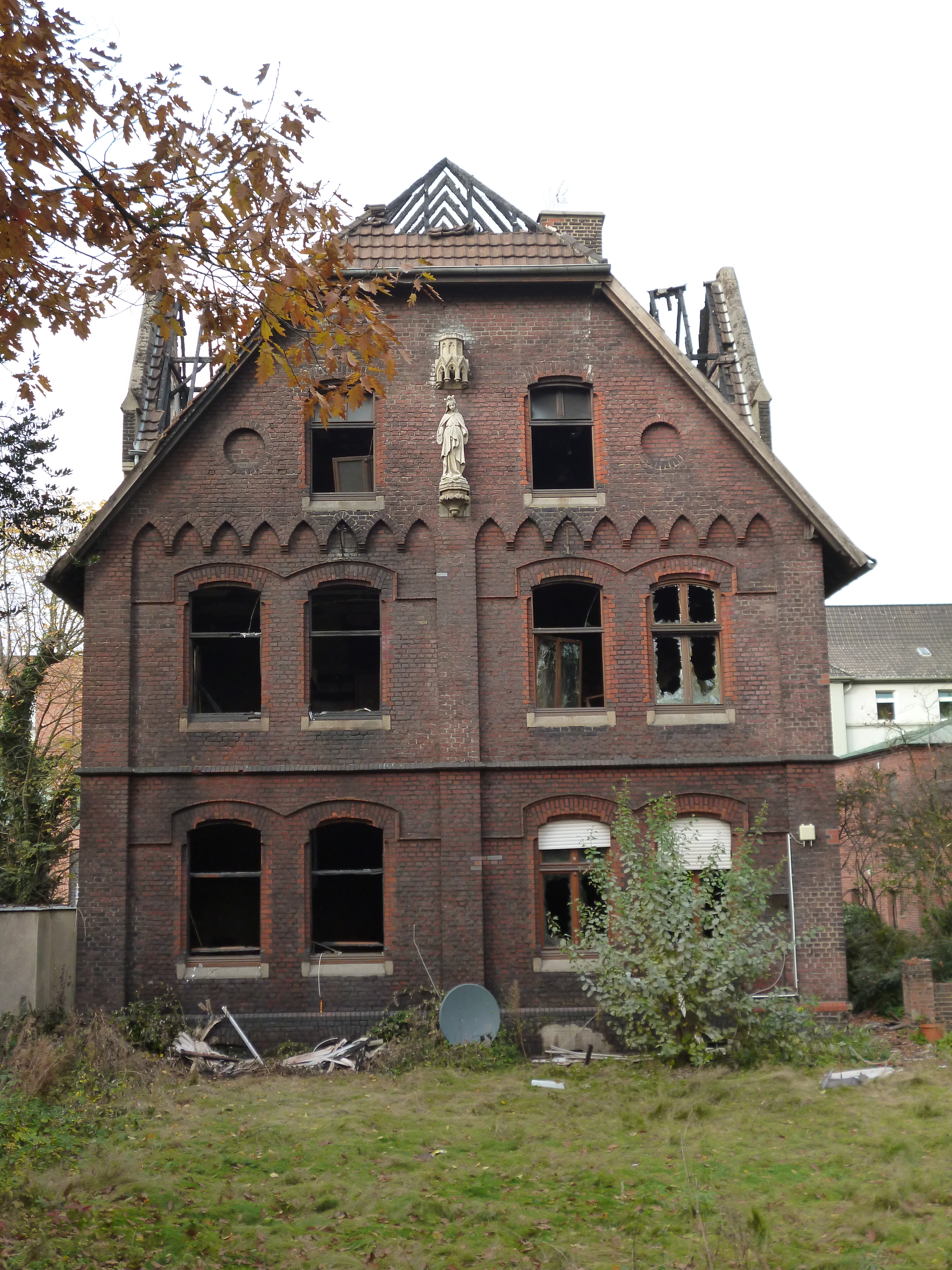 Ehemaliges Pfarrhaus St. Marien in Herne-Eickel nach dem Brand im Oktober 2016, gesehen von der Herzogstraße in Höhe Hausnummer 10, Blick auf Garten und Rückfront